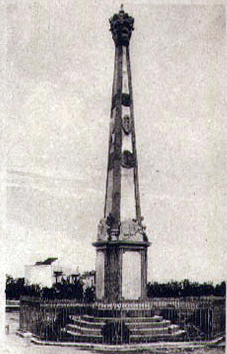 Obelisco conmemorativo de la batalla de 1734.